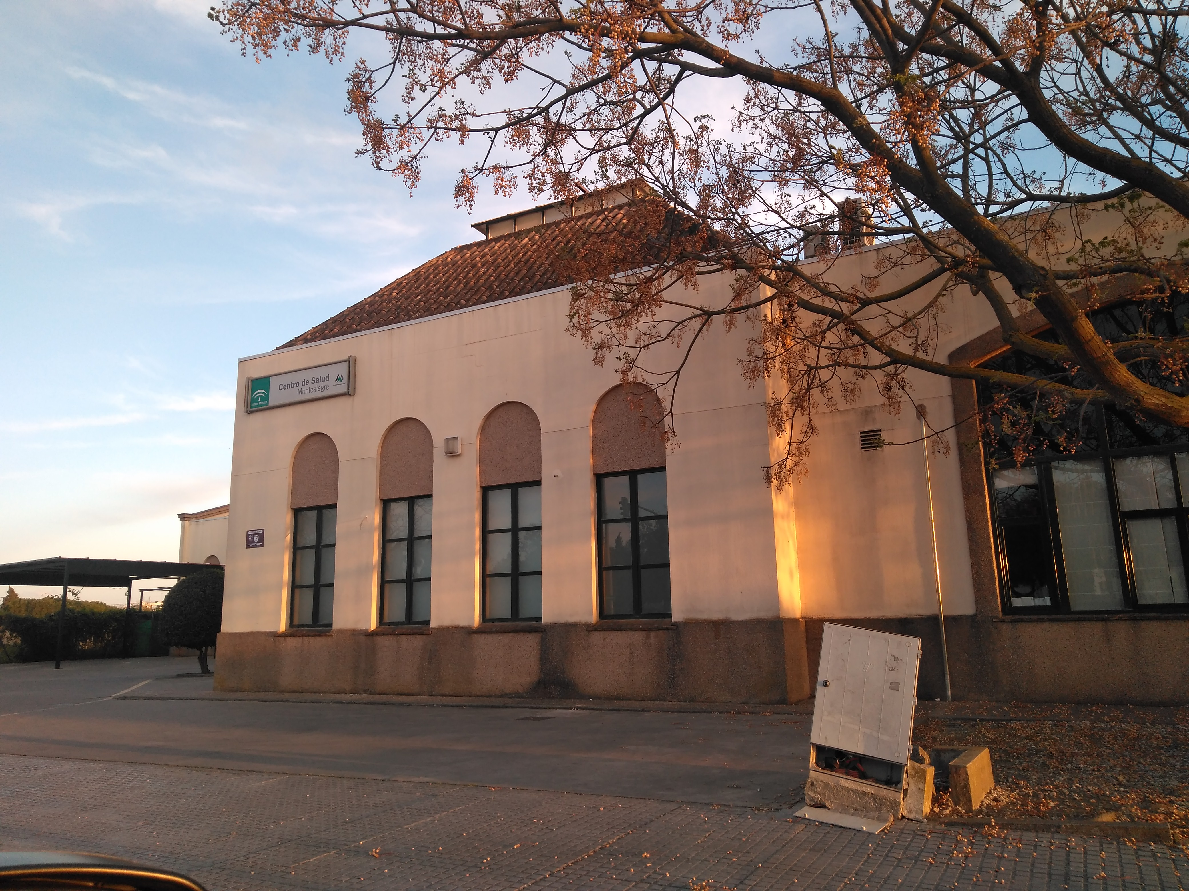 Centro de Salud Montealegre en Jerez de la Frontera (España)